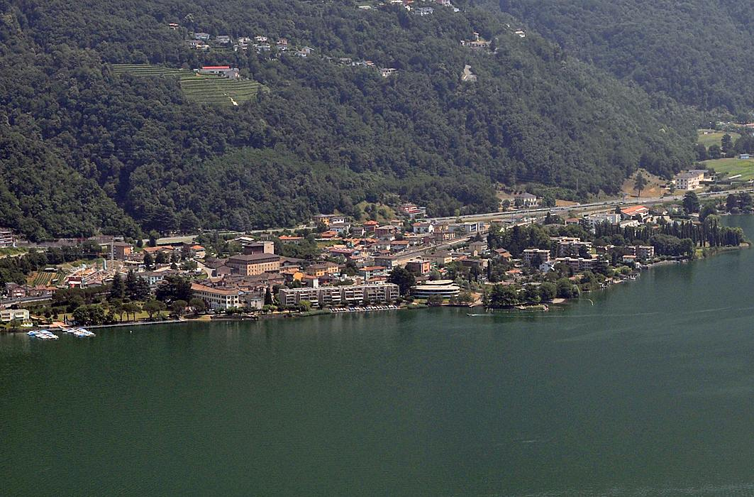 Maroggia, gesehen vom Monte San Salvatore